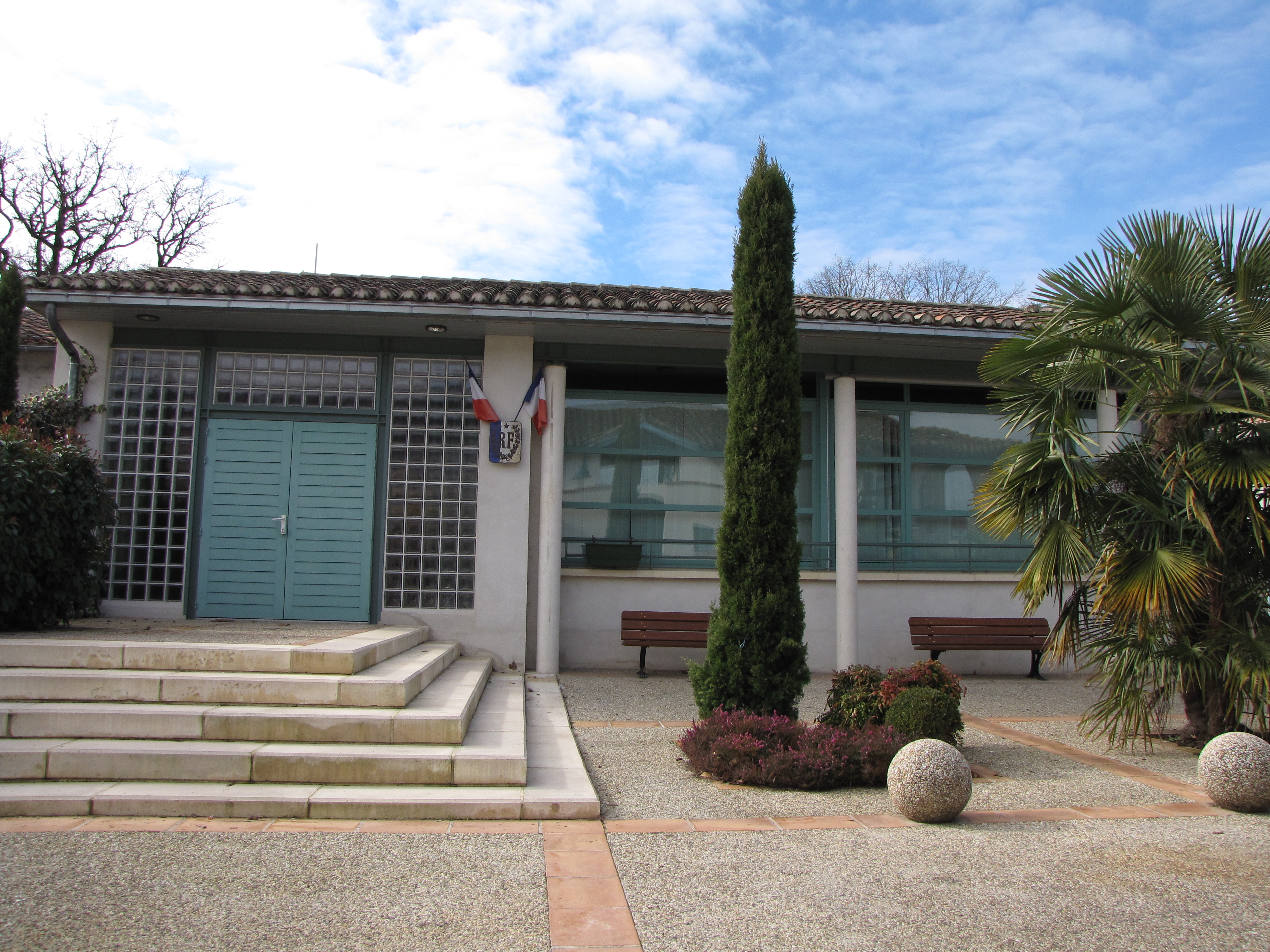 Mairie de Villemade